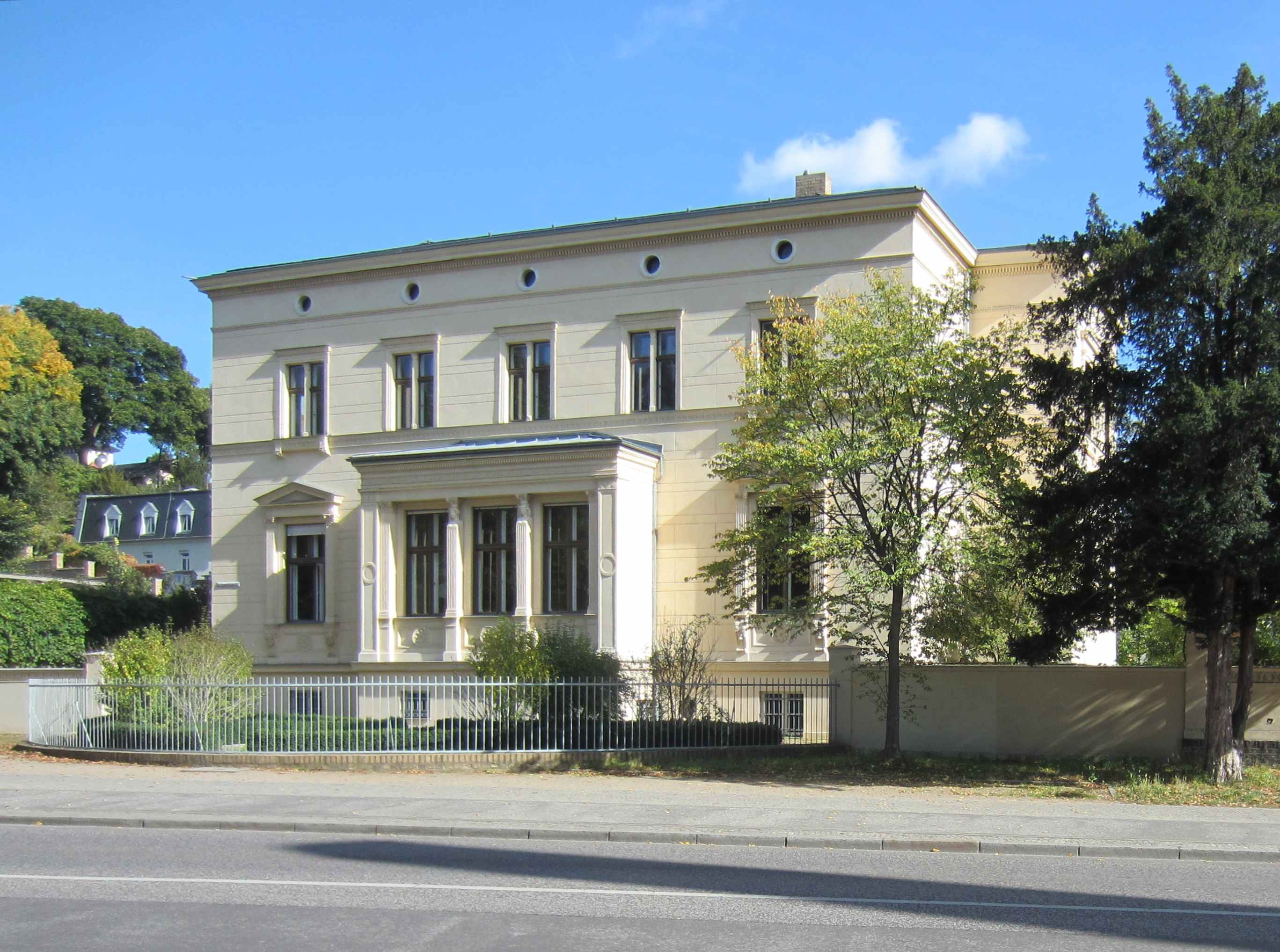 Denkmalgeschützte Villa von Arnim in Potsdam, Weinbergstraße 20